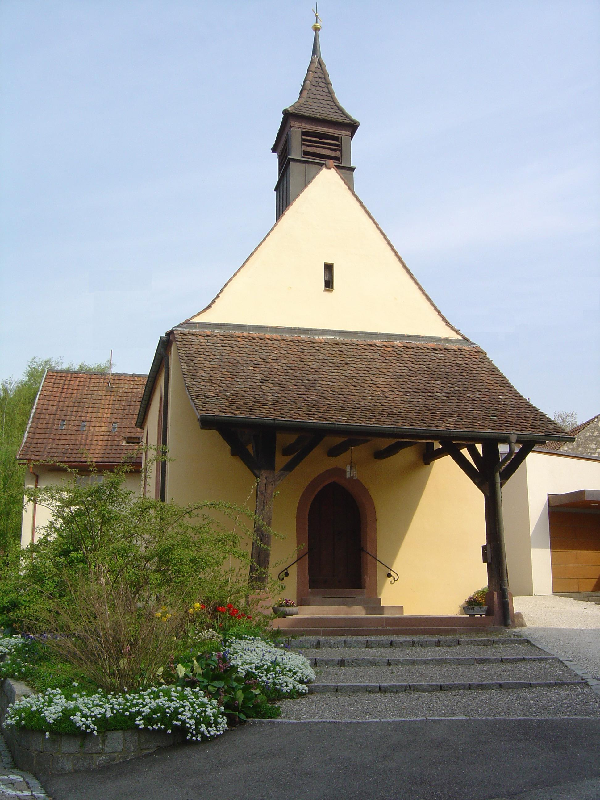 gotische Kapelle in Rümmingen